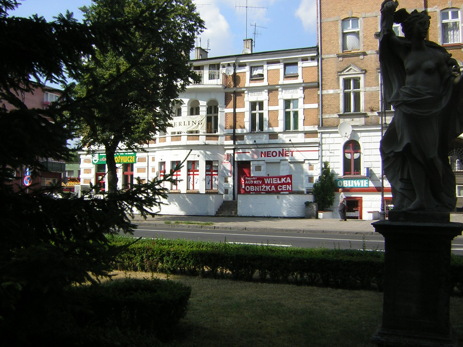 Kamienica przy ul. Niepodległości 4b w Iławie 03.1987.